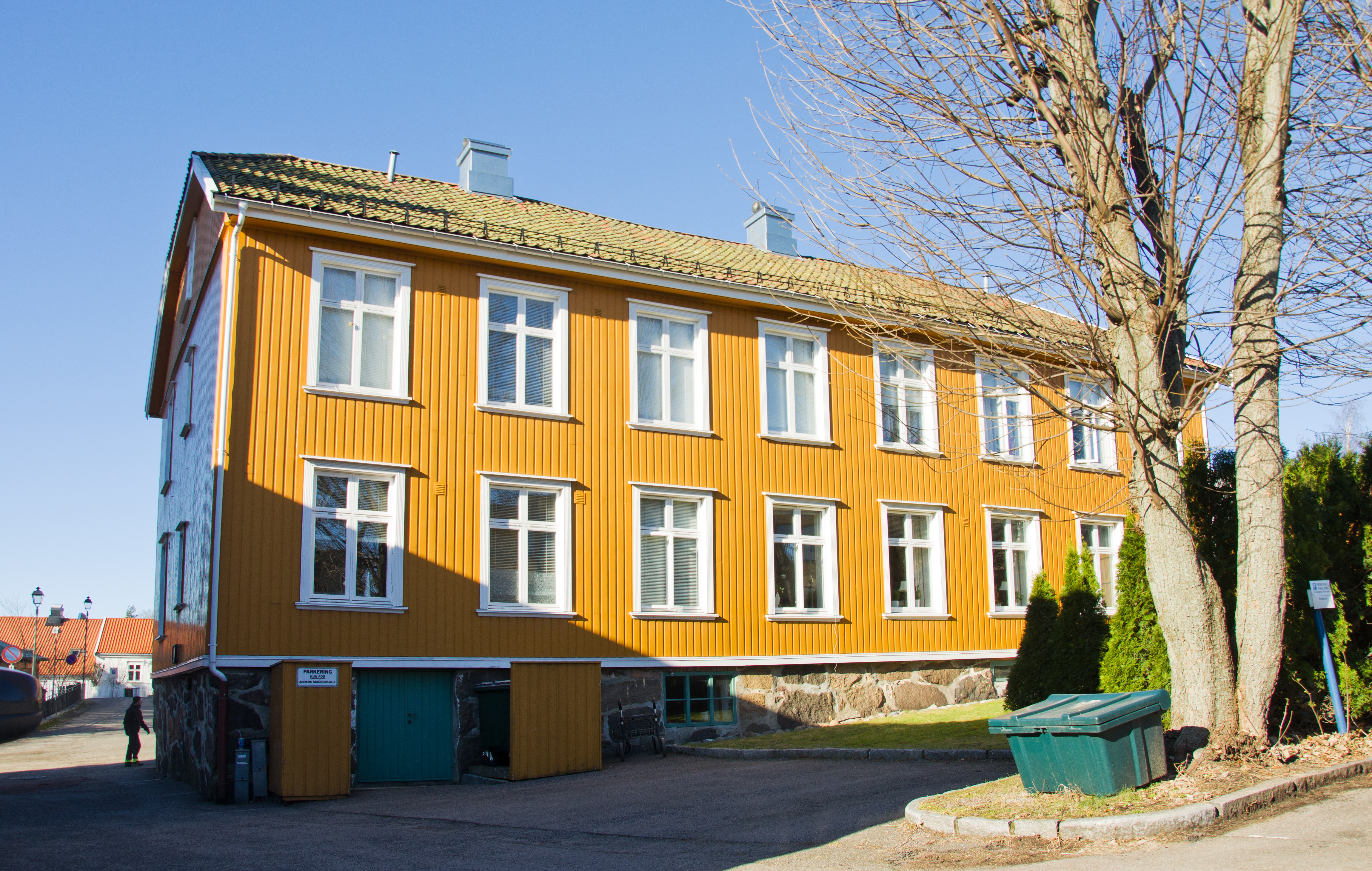 Anders Madsens gate 3, Tønsberg